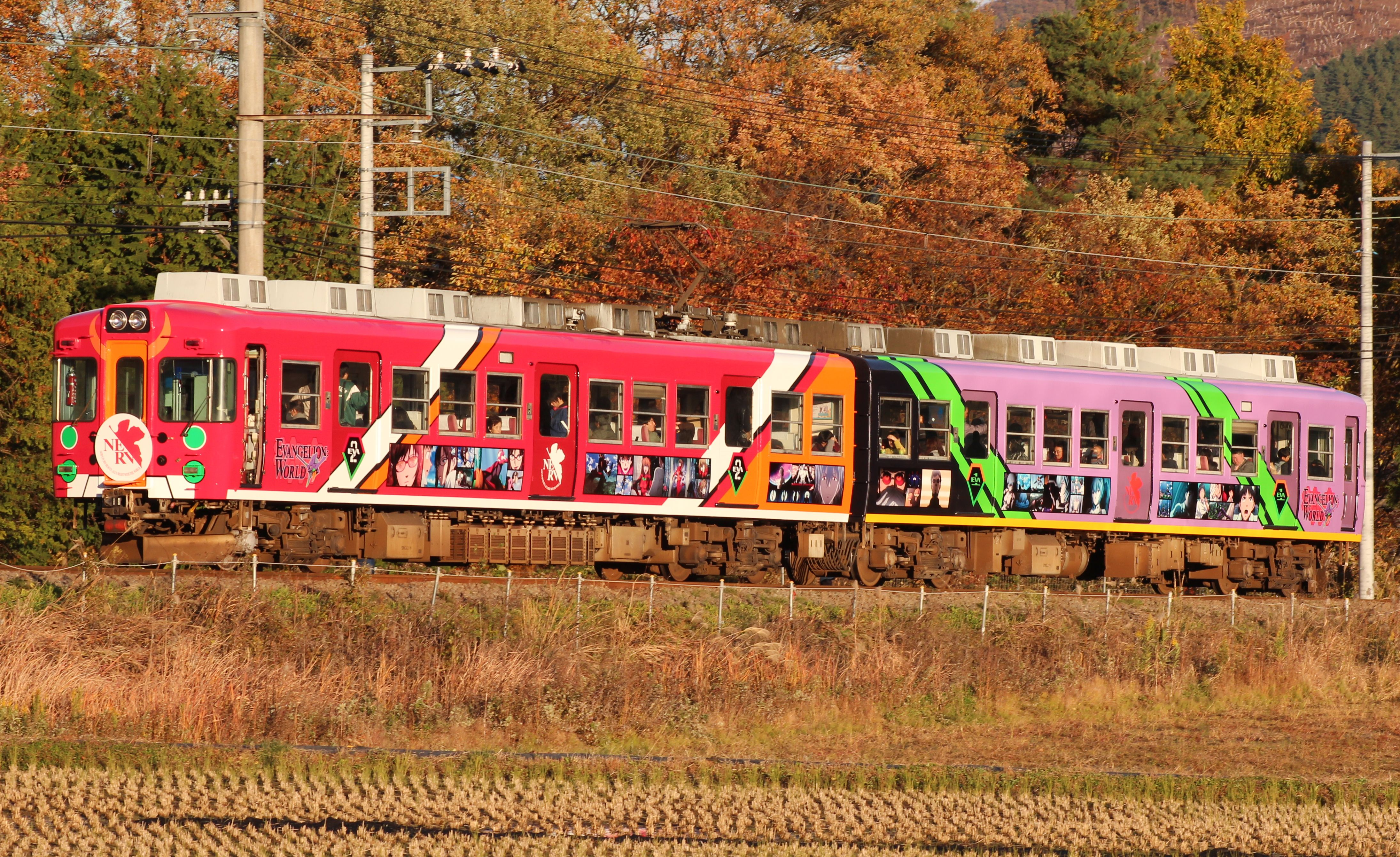 富士急行1200形電車 「ヱヴァンゲリヲン新劇場版:Ｑ公開記念電車」